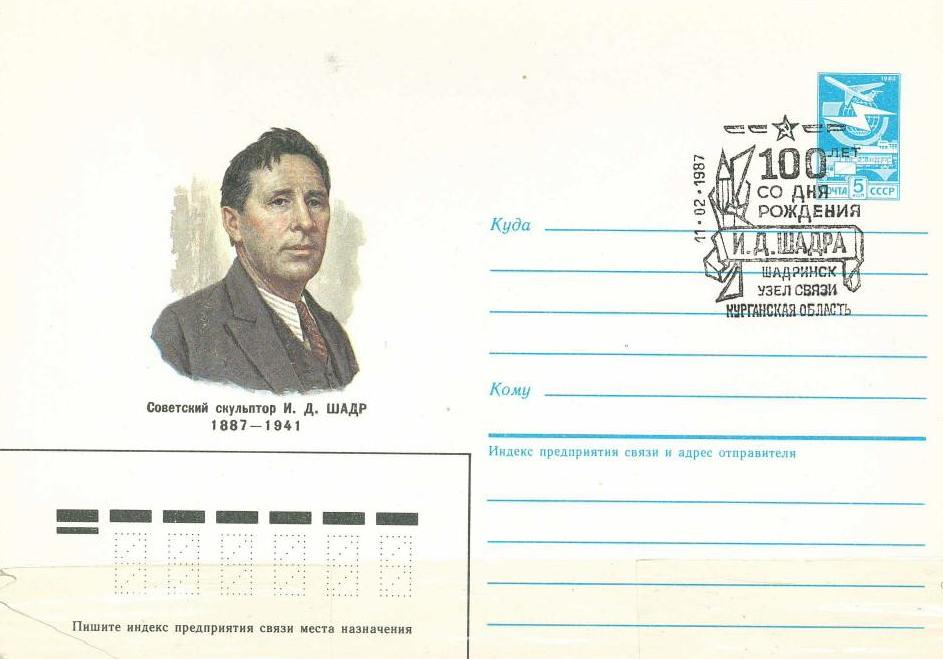 Шадр Иван Дмитриевич, почтовый конверт СССР